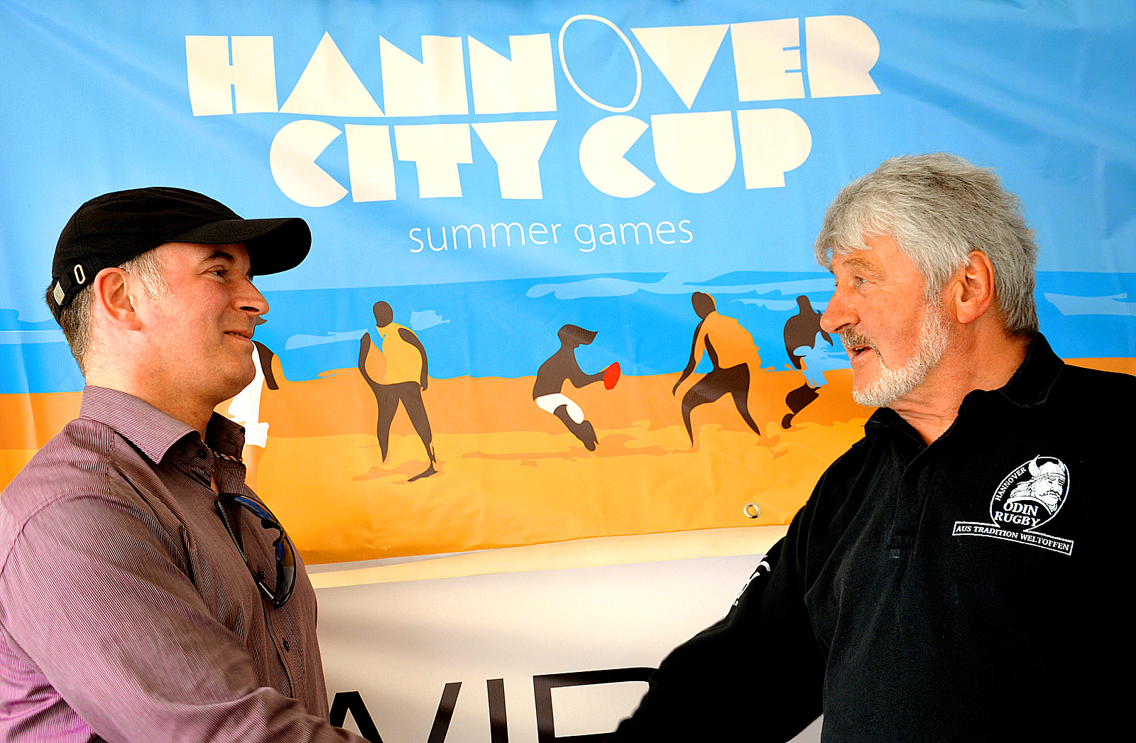 Für den 10. bis 12. Juli 2015 organisierte Horst Josch vom SV Odin von 1905 anlässlich der Hannover City Cup summer games die mittlerweile „Dritte offene Deutsche Beachrugby-Meisterschaft 2015“, Austragungsort ist der Platz der Goseriede zwischen dem Tiedthof, dem Anzeiger-Hochhaus und der Nikolaikapelle in Hannover. Auf diesem Foto reichen sich Horst Josch, zugleich Integrationsbeauftragter, Projektentwickler und Sponsorenbetreuer vom SV Odin von 1905, und der Bezirksbürgermeister des hannoverschen Stadtbezirks Mitte, Michael Sandow, die Hände zur gelungen Auftaktveranstaltung ...